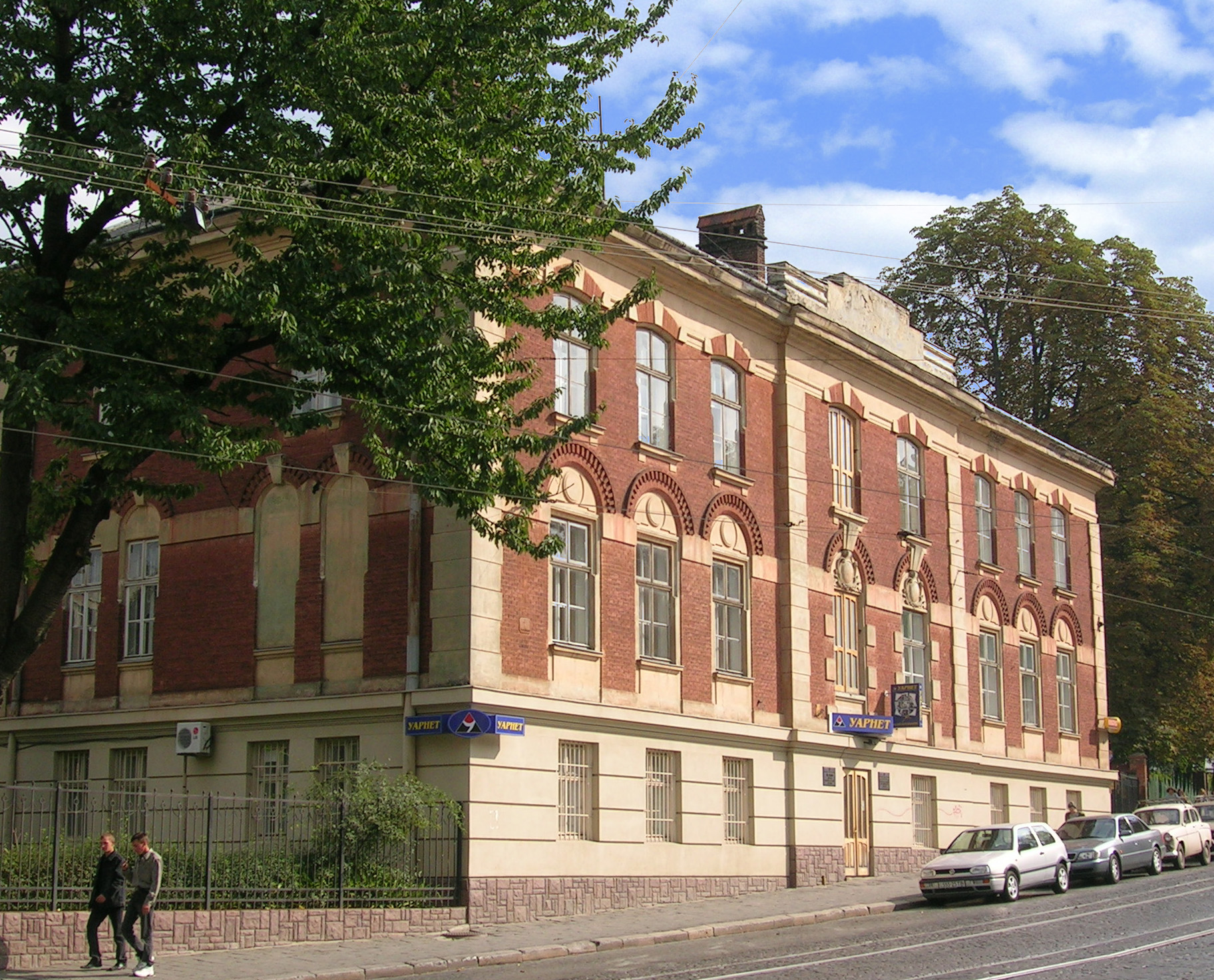 Головна будівля Інституту фізики конденсованих систем НАН УКраїни. Розташована за адресою: Львів, вул. Свєнціцького,1. Споруджена в 1900 році за проектом архітектора Людвіка Вежбицького.